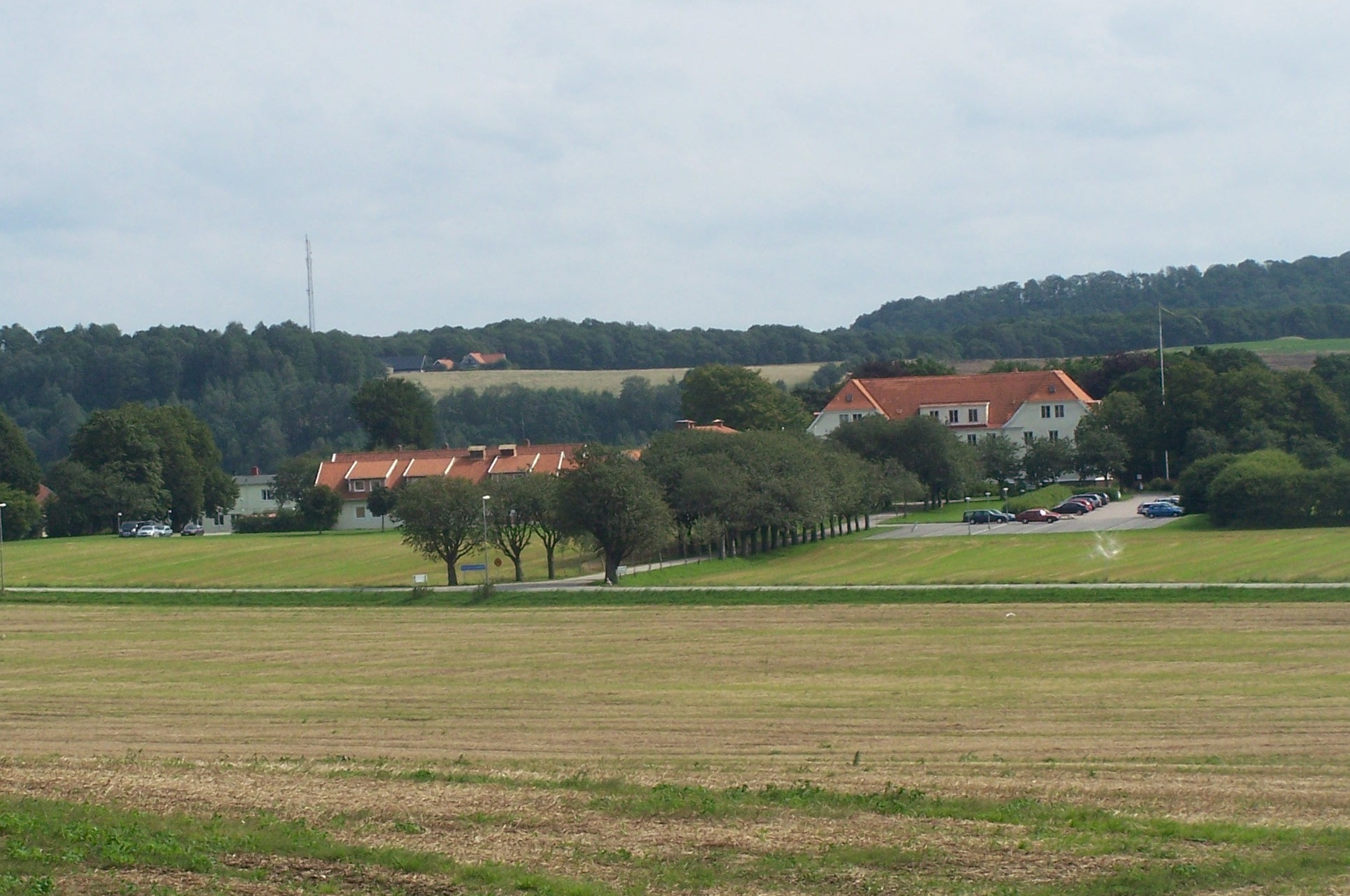 Katrinebergs folkhögskola